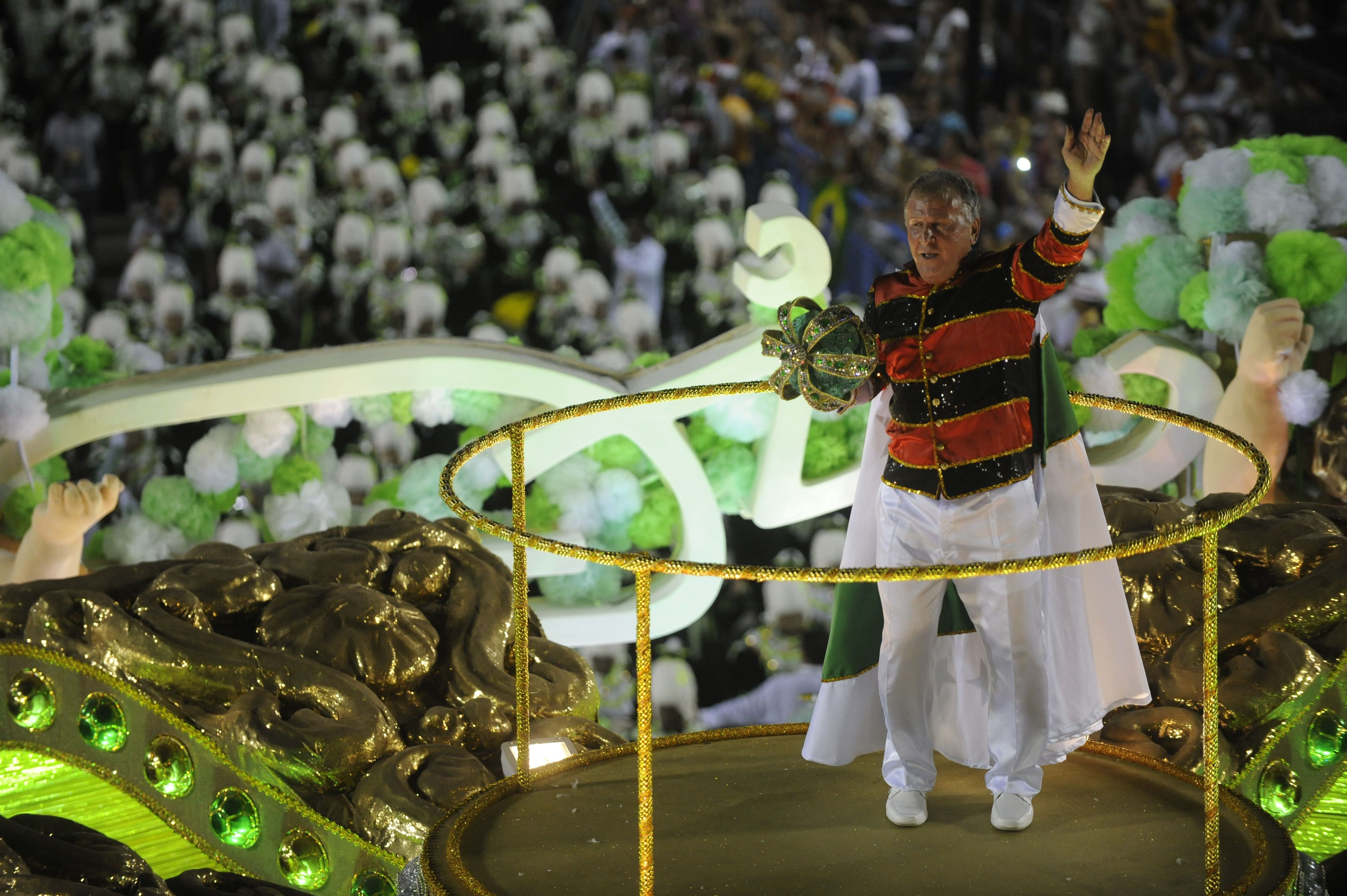 Rio de Janeiro - Escolas de samba do Grupo Especial se apresentam no Sambódromo da Marquês de Sapucaí, no segundo dia de desfiles (Fernando Frazão/Agência Brasil)